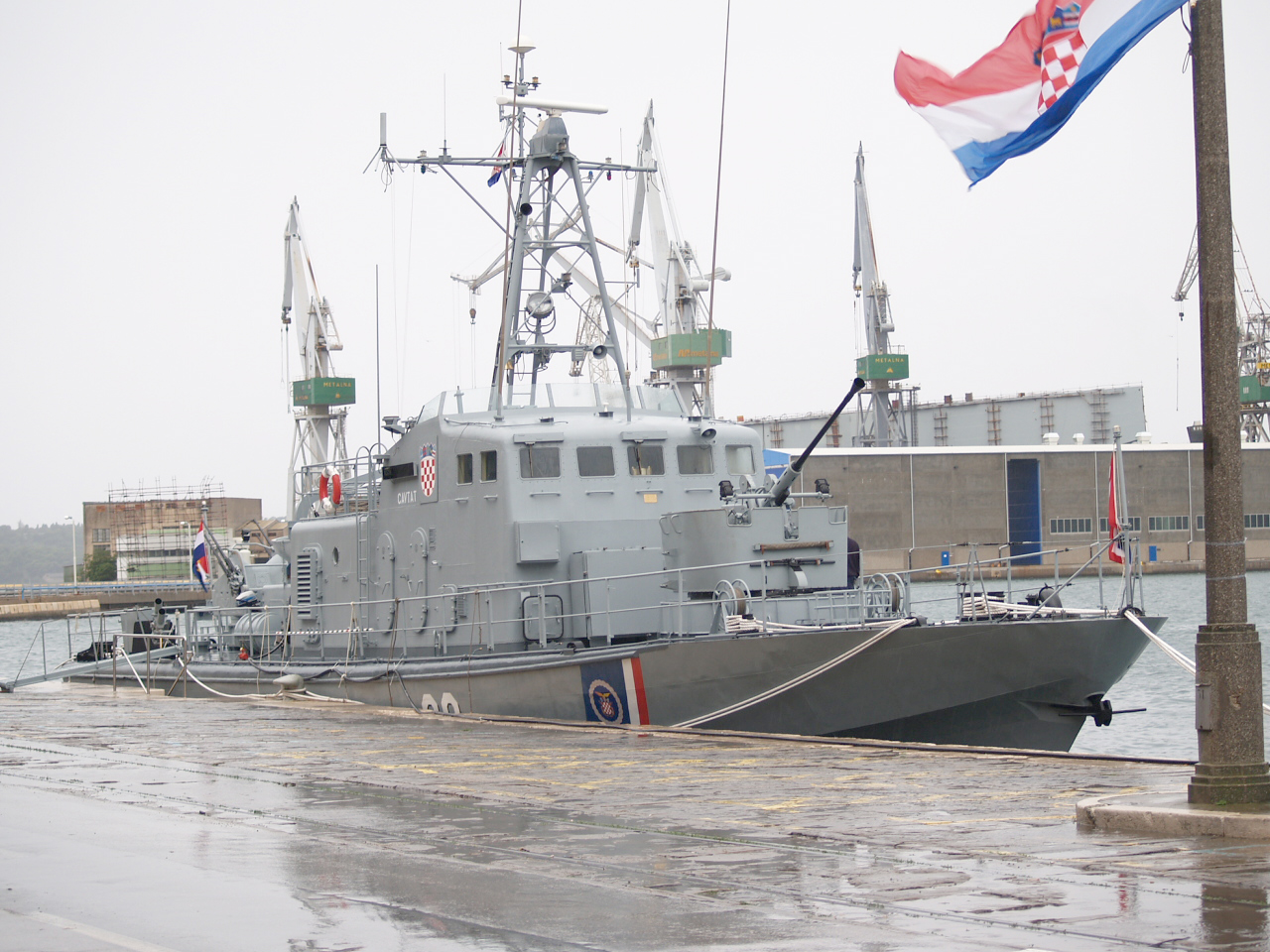 OB-63 Cavtat